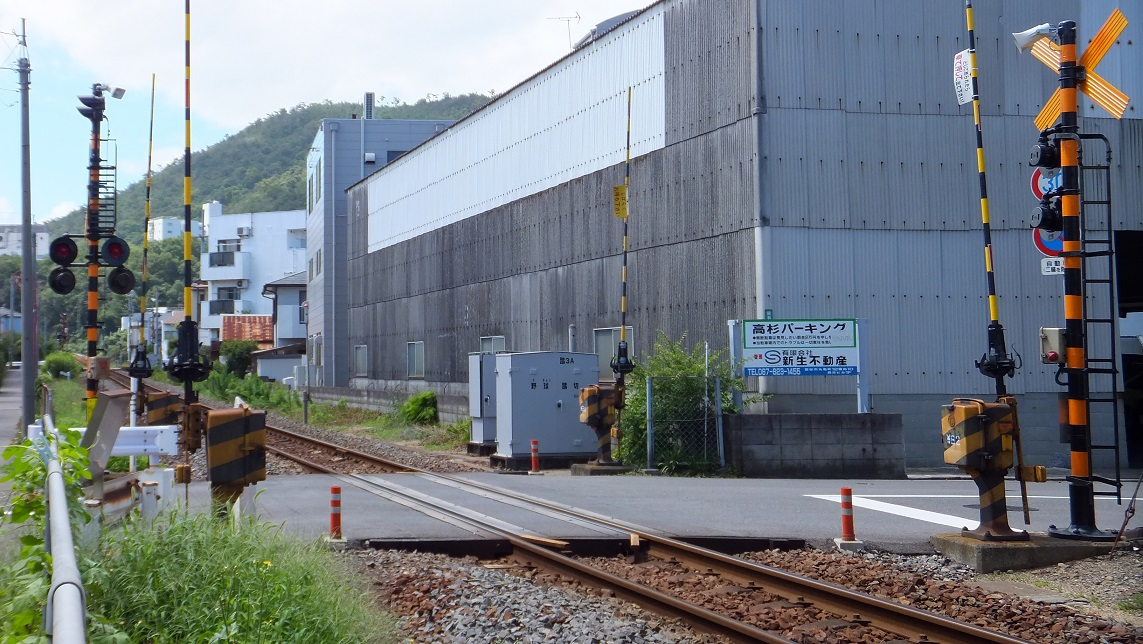 高松市昭和町二丁目 JR四国高徳線野球踏切